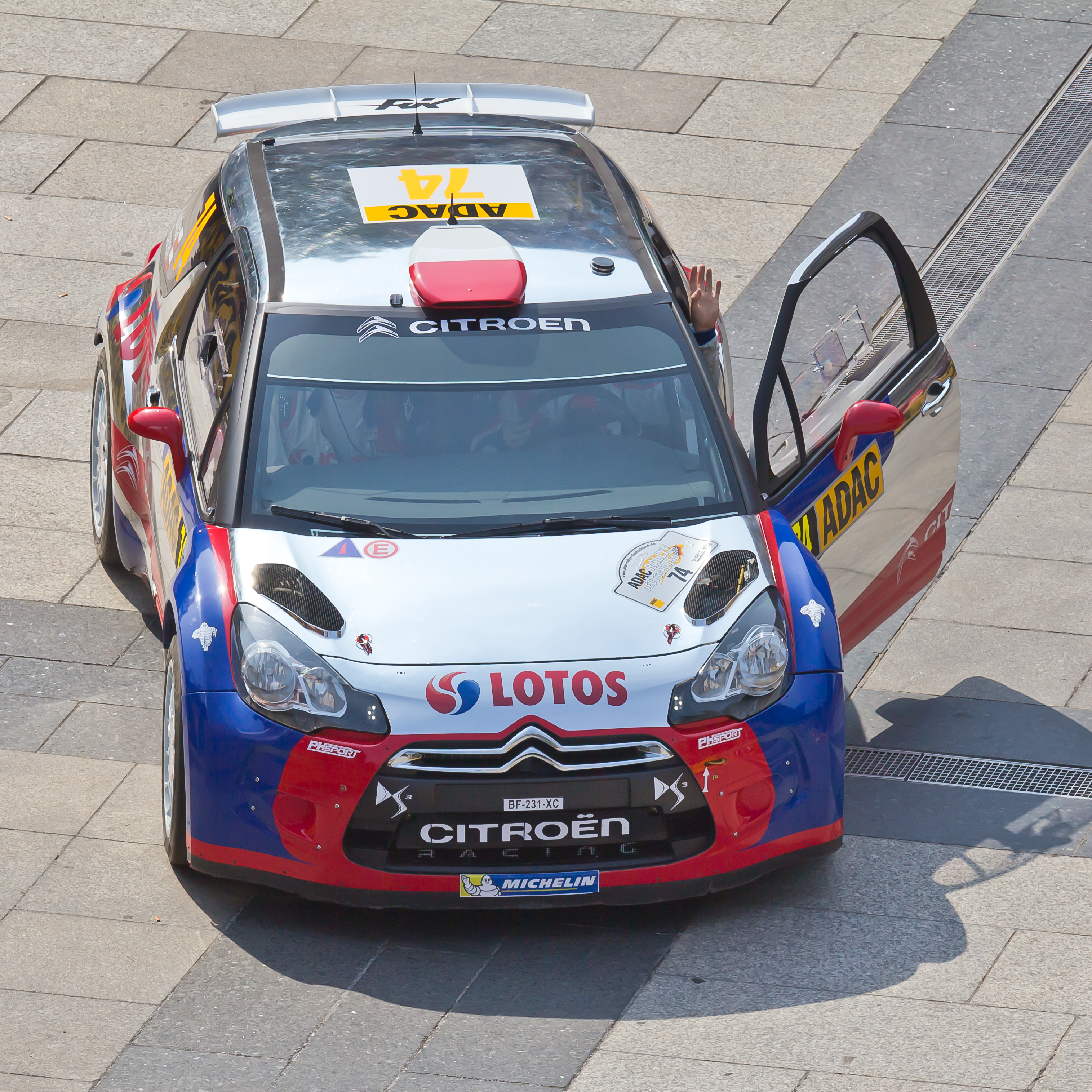 ADAC Rallye Deutschland 2013 - Fahrerpräsentation auf dem Roncalliplatz: Lotos Team WRC mit dem Fahrer Robert Kubica und Co-Fahrer Maciek Baran im Citroen DS3 RRC